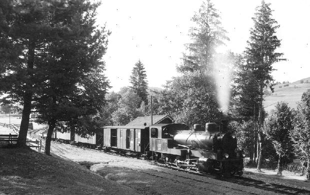 G 4/5 der Appenzeller Bahn mit gemischtem Personen- und Güterzug in Gontenbad